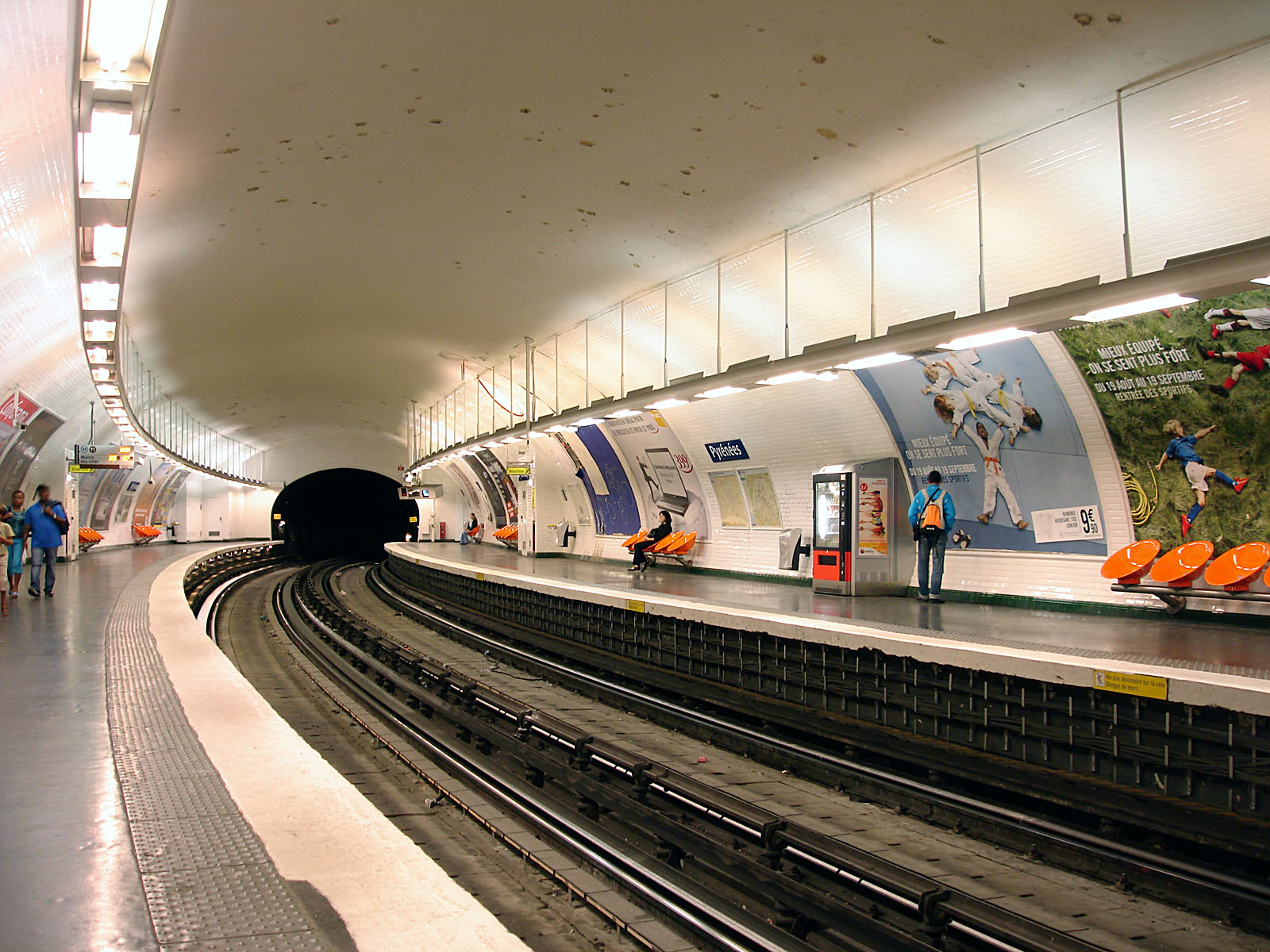 La station Pyrénées de la ligne 11 du métro de Paris, France